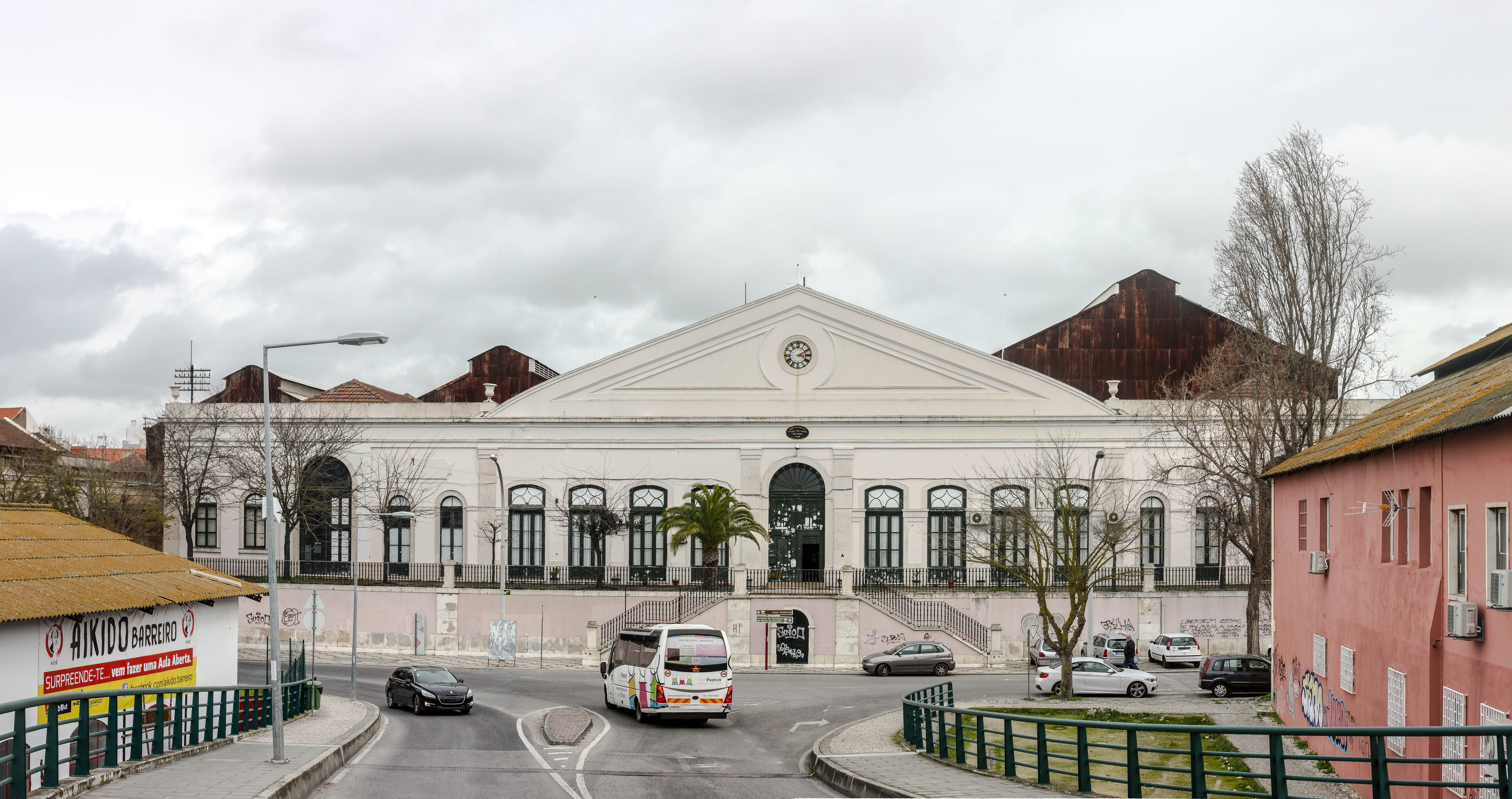 Edifício da antiga estação do Barreiro, utilizada posteriormente para o Complexo Oficinal da EMEF na cidade.